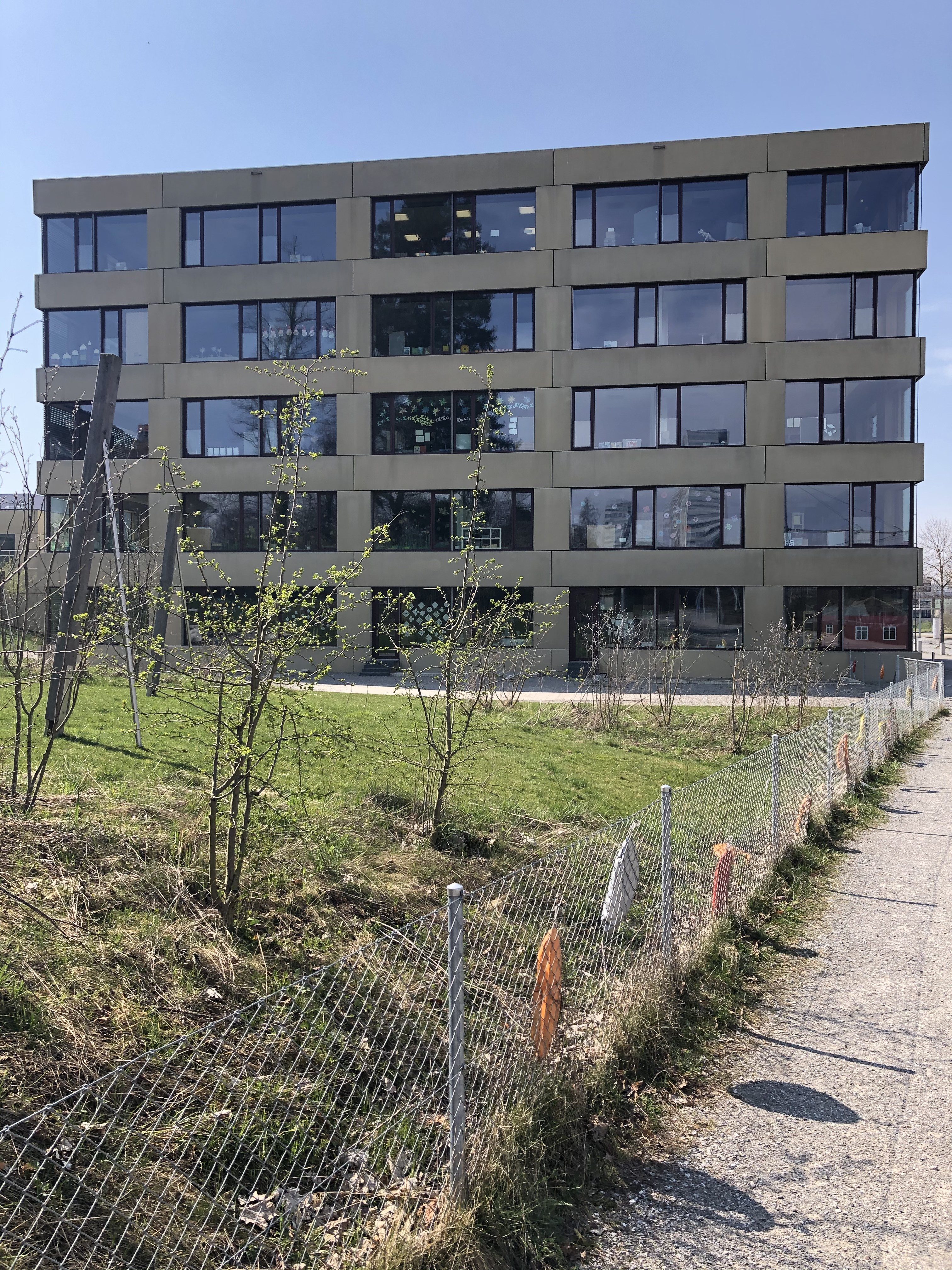 Schule Bern Brünnen